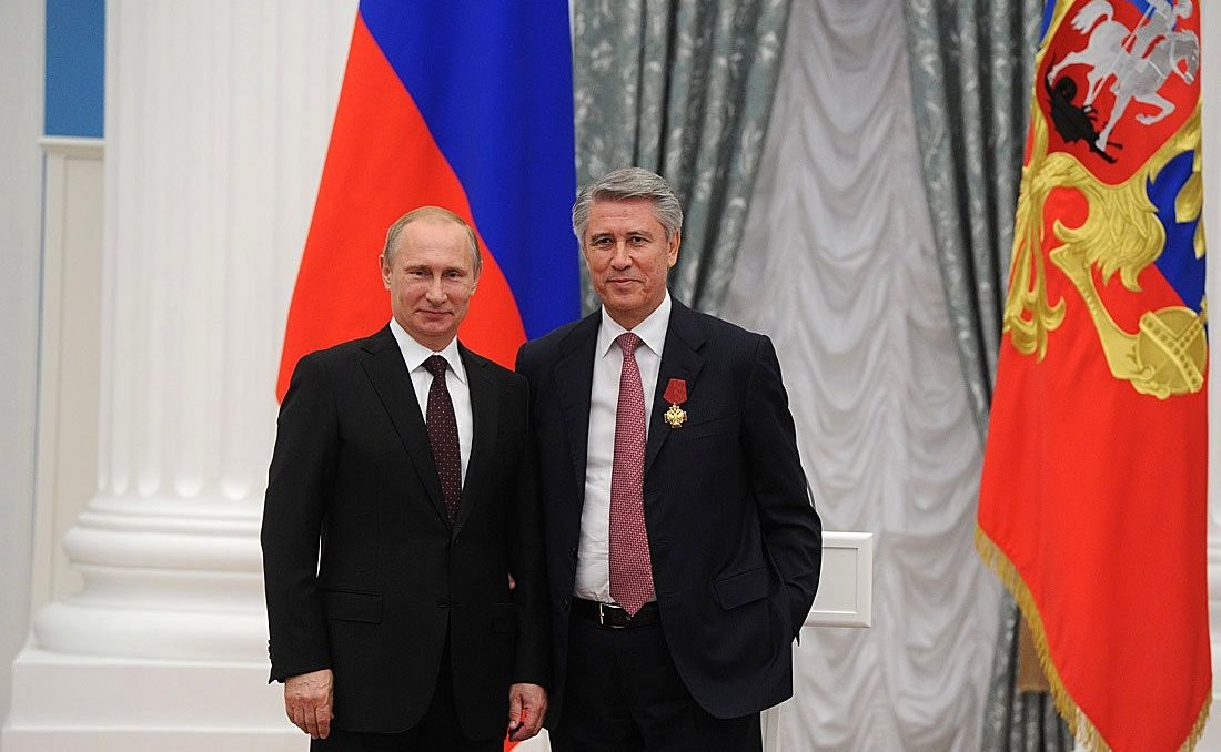 Орденом «За заслуги перед Отечеством» IV степени награждён Мухадин Эскиндаров